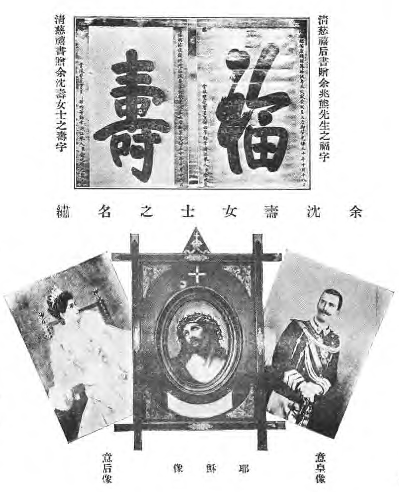 慈禧賜余兆熊余沈壽之福壽字及余沈壽女士之名繡